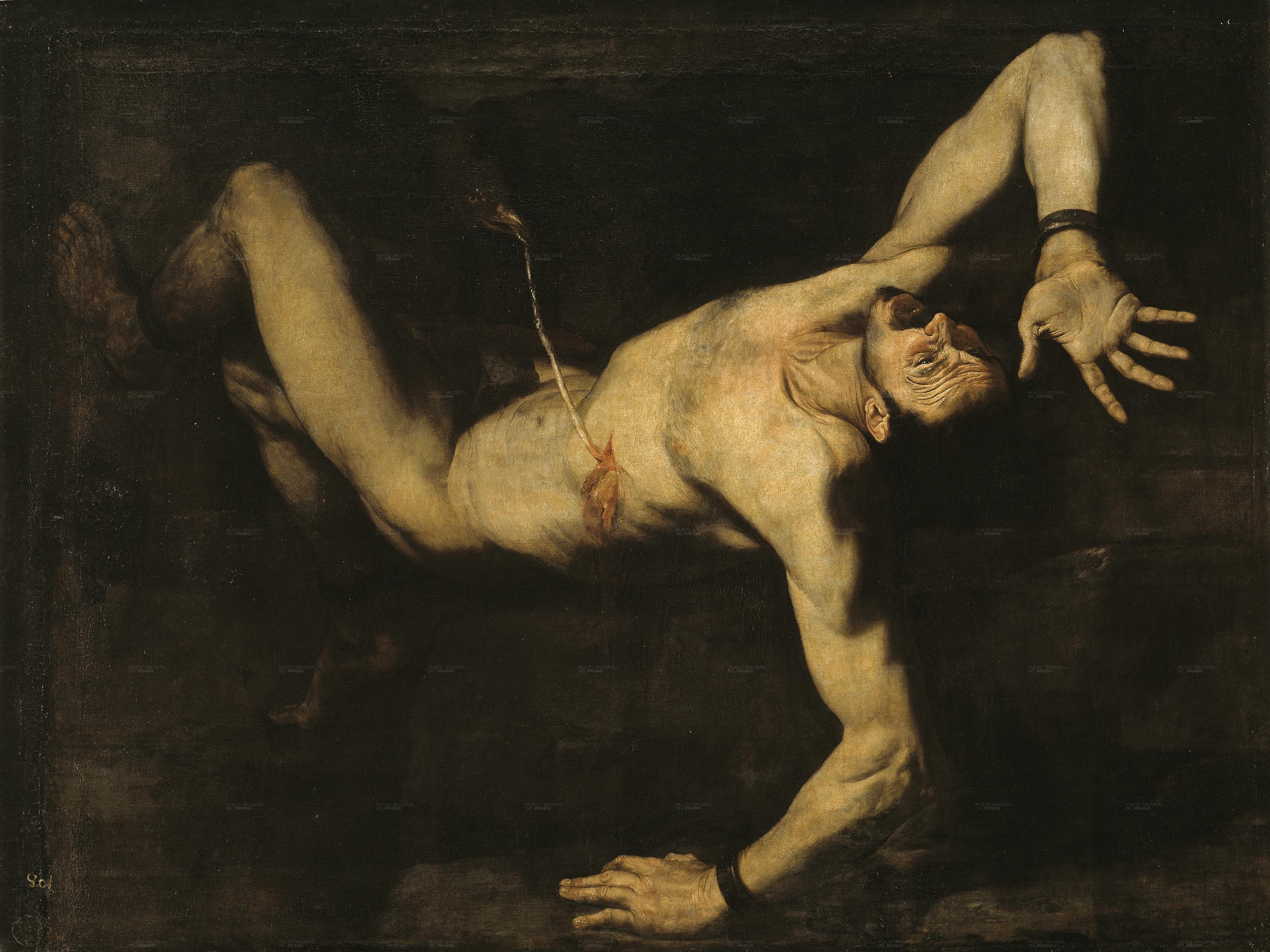 Tityos